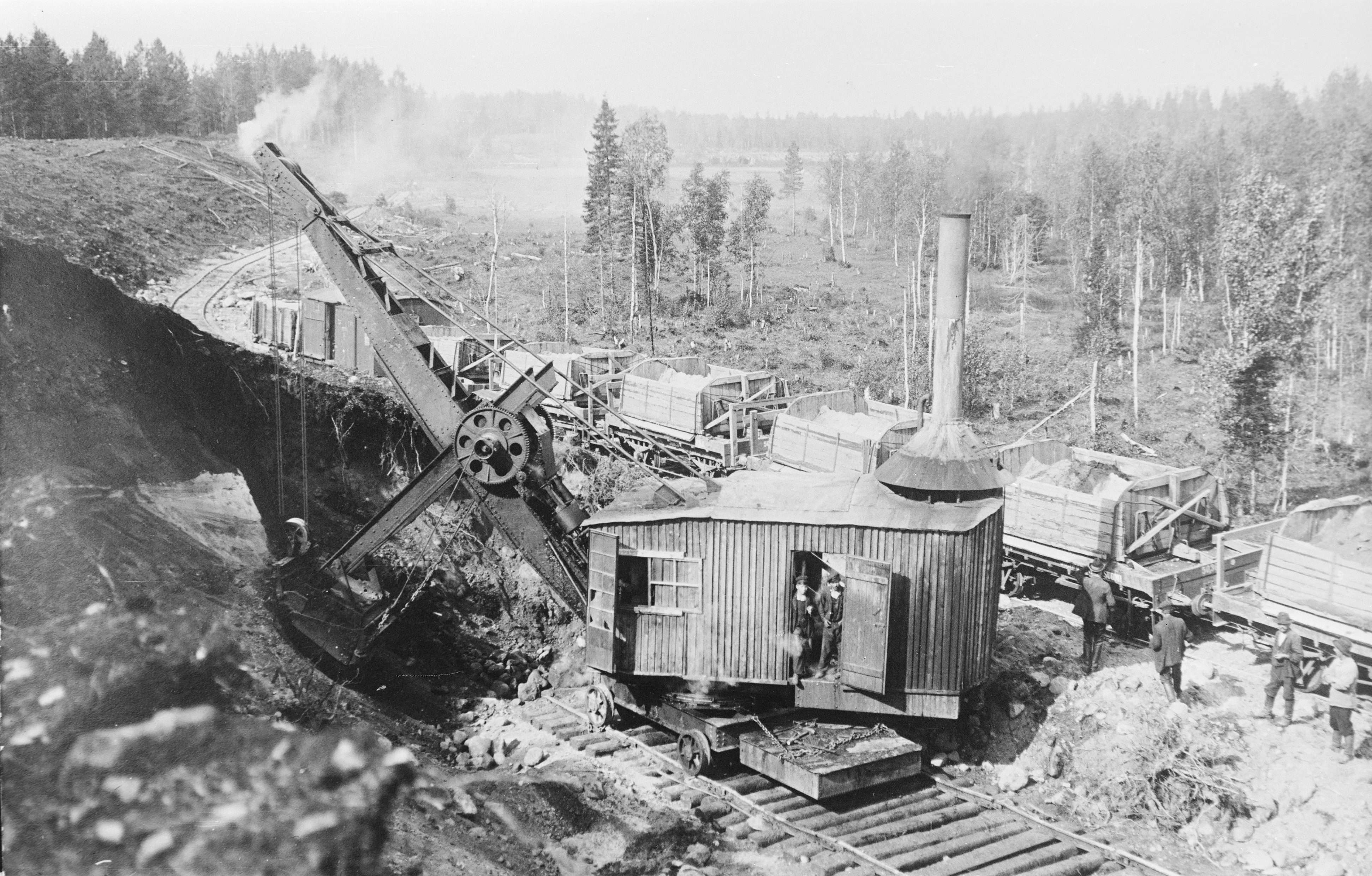 Суоярви, 1920-е - строительство дороги